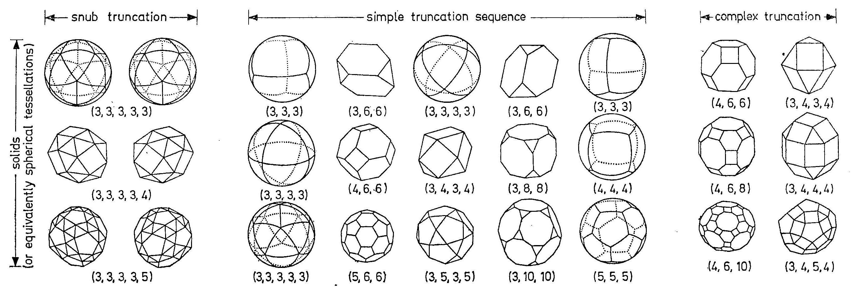 A platóni és arkhimédeszi testek periódusos rendszere